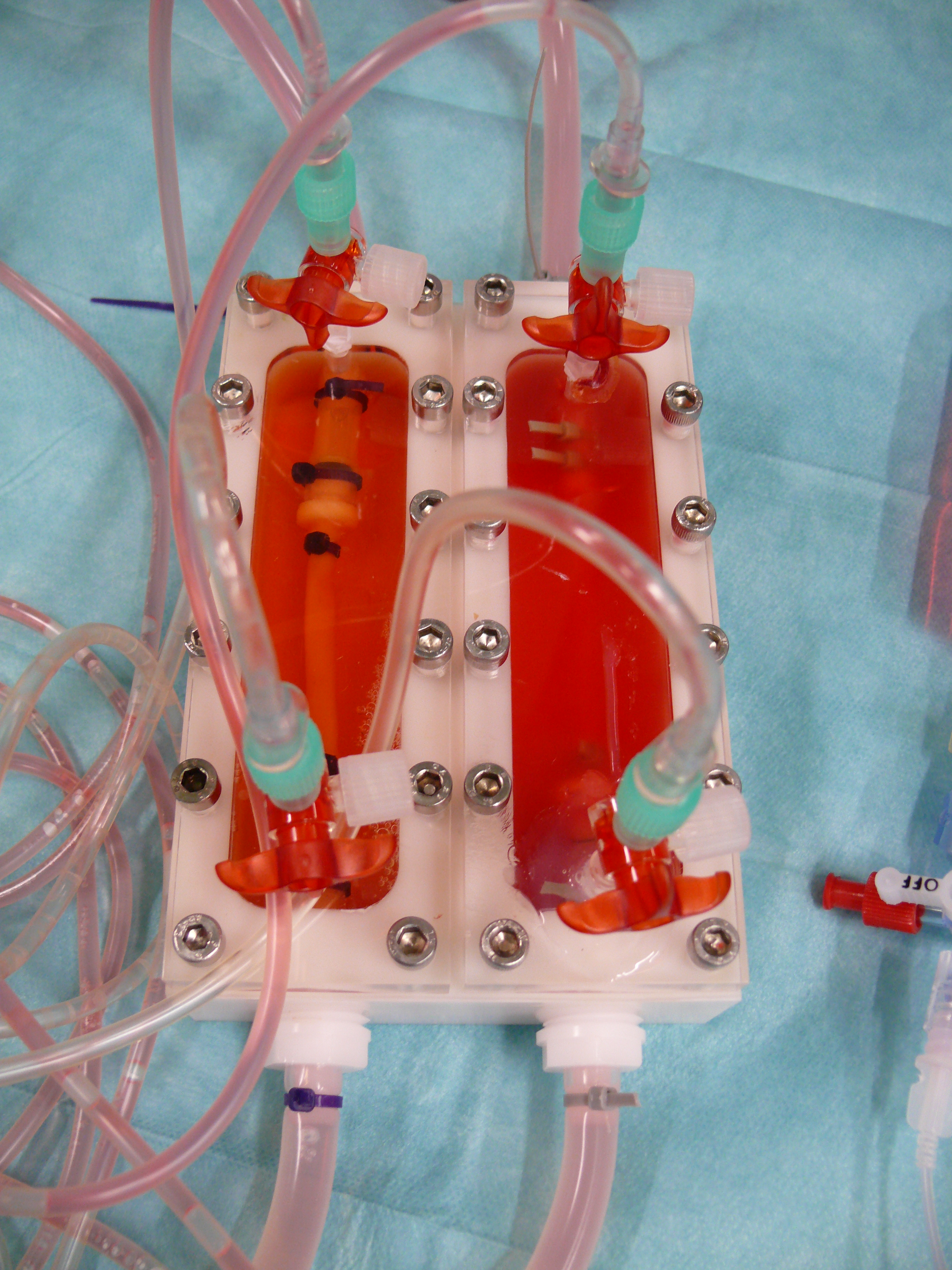 Bioreaktorsystem zur Gefäßprothesenkultivierung.